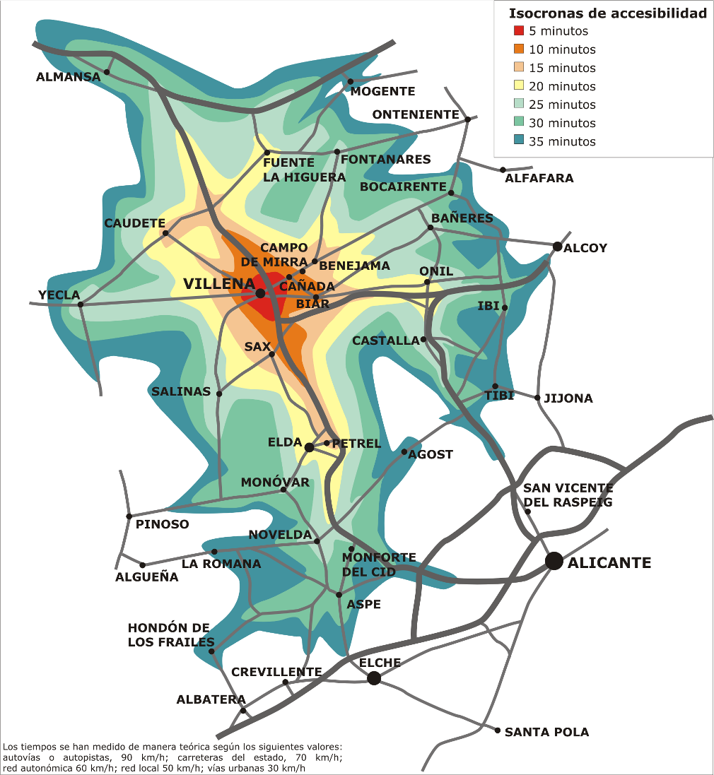 Isocronas de accesibilidad por carretera a Villena